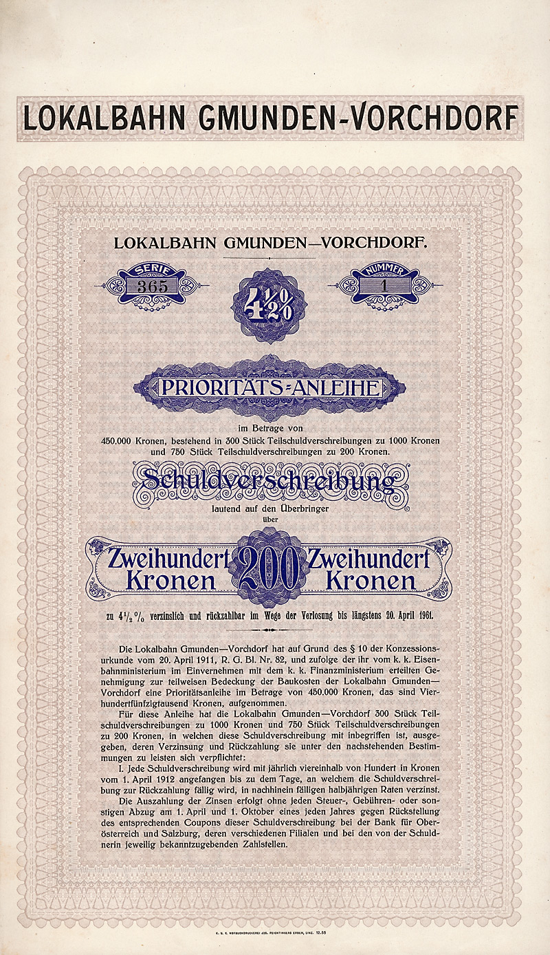 Schuldverschreibung über 200 Kronen der Lokalbahn Gmunden-Vorchdorf vom 26. Juli 1912